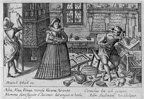 "Cornelius bin ich genant, allen Studenten wollbekant", Kupferstich aus dem Speculum Cornelianum von 1608/1618, Rechte abgelaufen, Public Domain